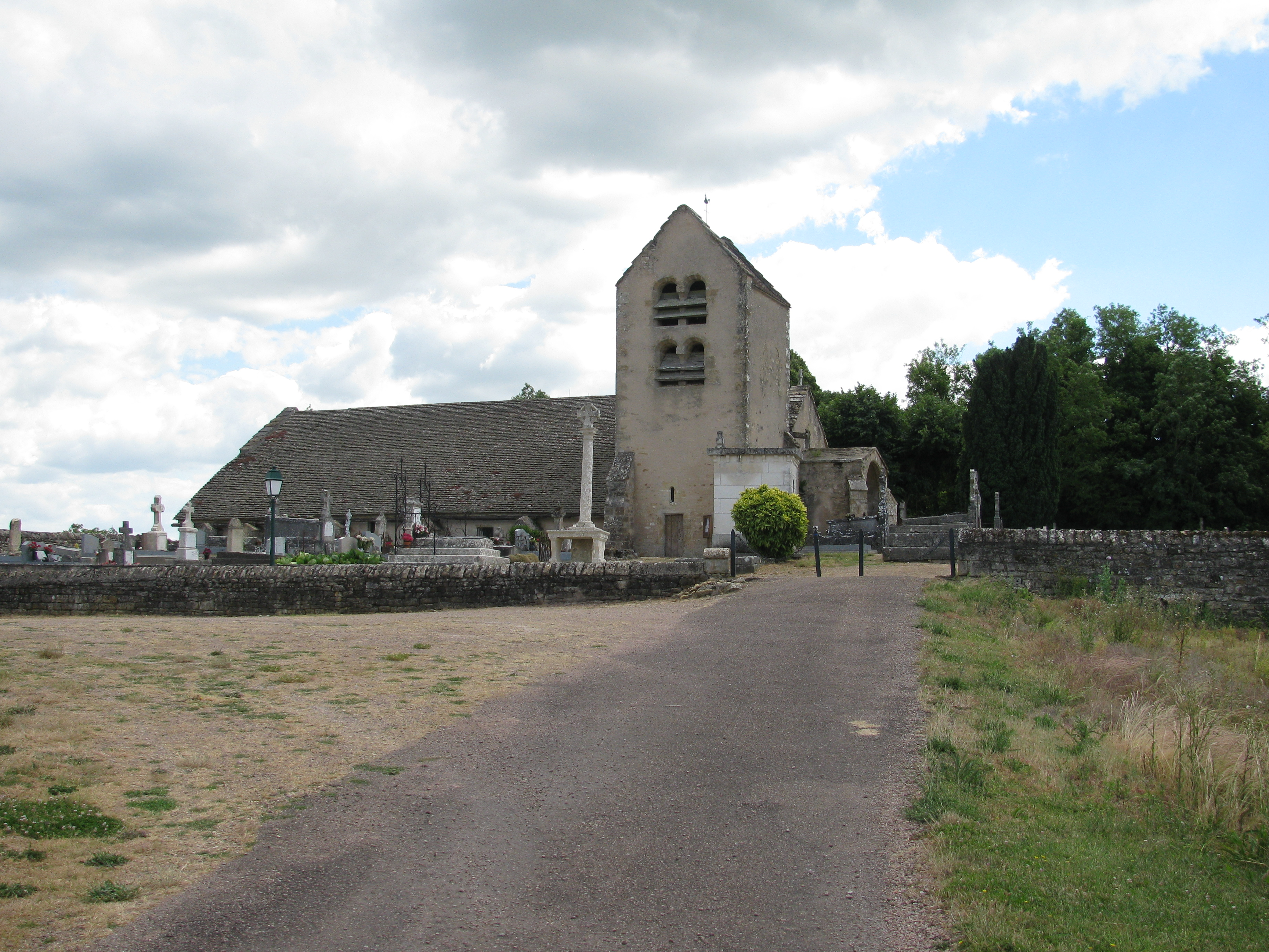 Notre-Dame de l'assomption. XIIe, XIIe et XIVe siècle. À Metz-le-Comte, Nièvre, France.